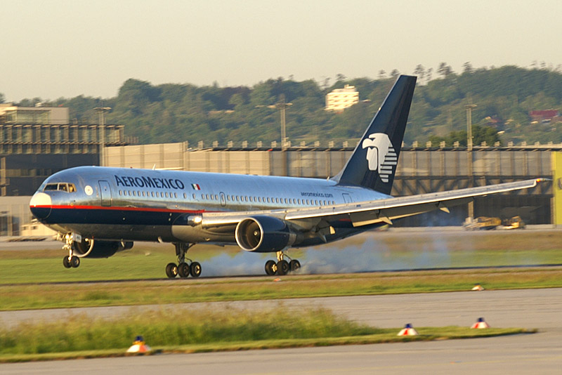 Boeing 767-200 de Aeromexico